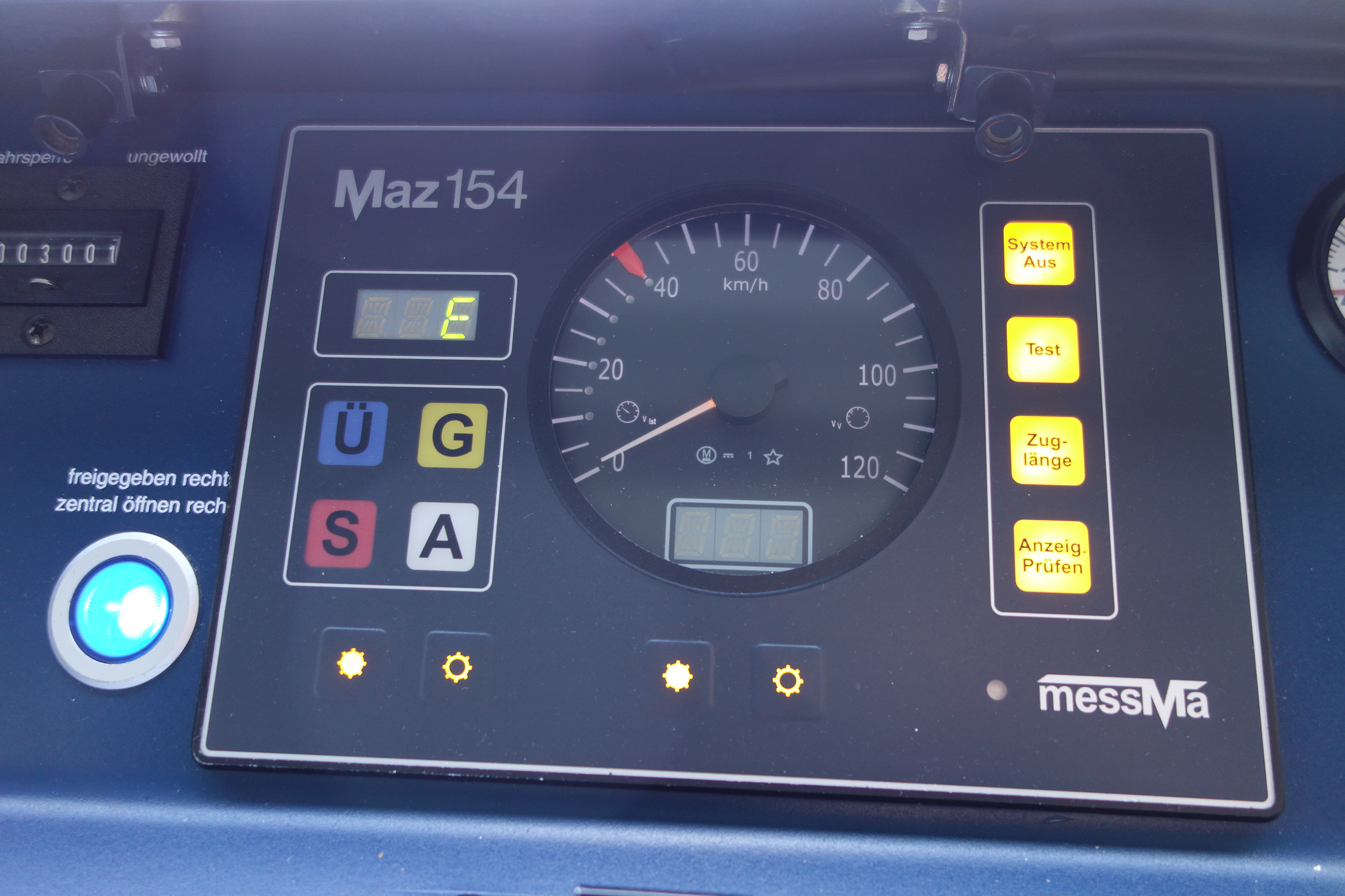 ZBS-Bediengerät (Führerraumanzeige) der S-Bahn Berlin, eingebaut in einem Zug der BR 481